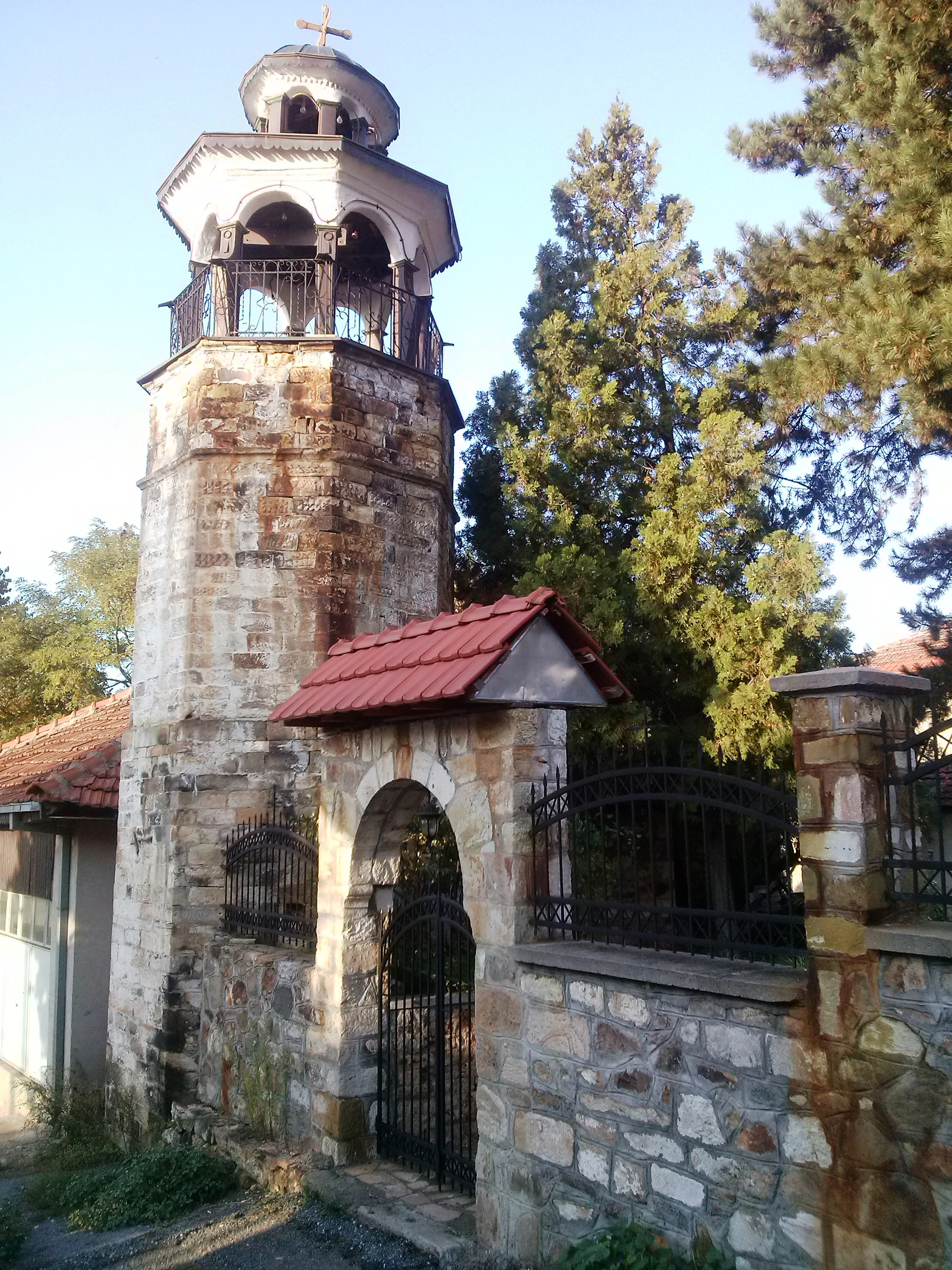 Гробјанска црква, Шлегово